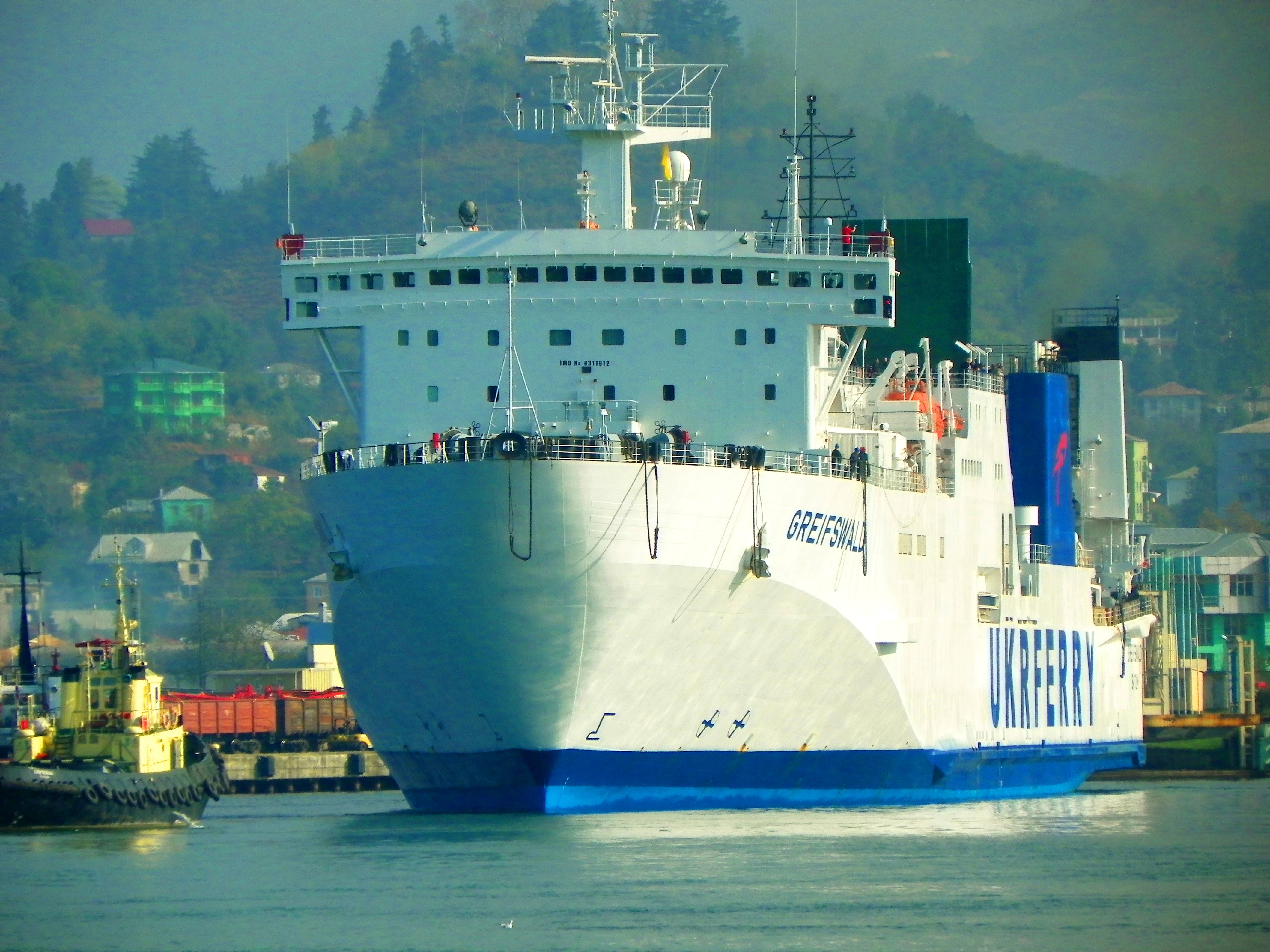 Ferry "Greifswald" entering Batumi sea port